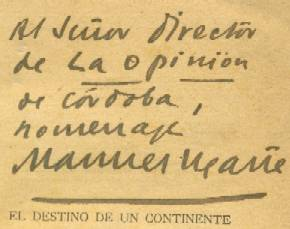 Firma manuscrita de Manuel Ugarte